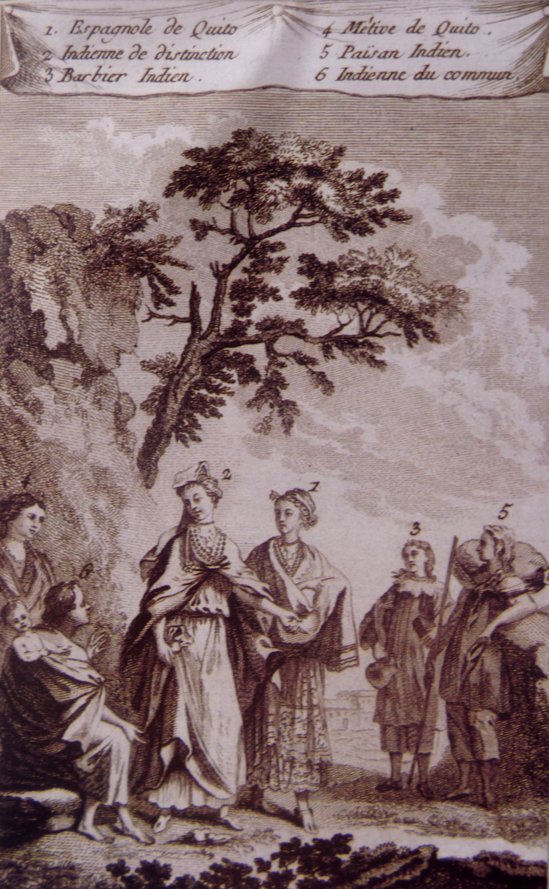 "Dama principal de Quito y su corte indígena" (grabado anónimo) - Siglo XVII 1. Española de Quito 2. Indiana de distinción (criolla) 3. Indígena bárbara 4. Nativa de Quito (mestiza) 5. Indígena viajera 6. Indiana común (criolla pobre)